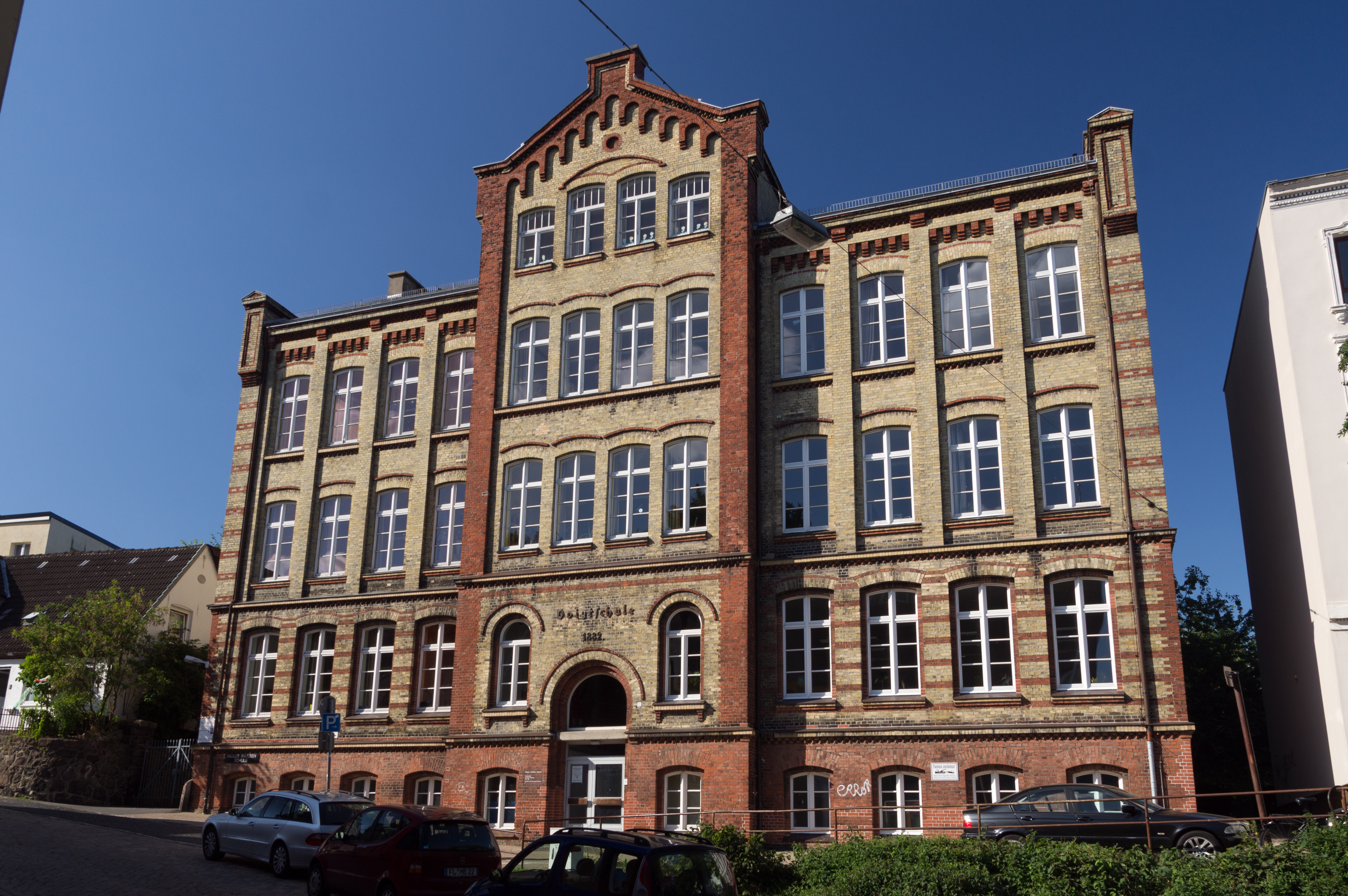 Flensburg-Neustadt, Schlossstraße 28. Paulus-Paulsen-Schule ehem. Voigtschule